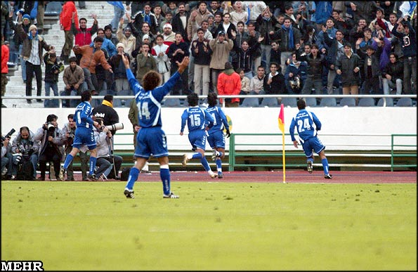 گزارش